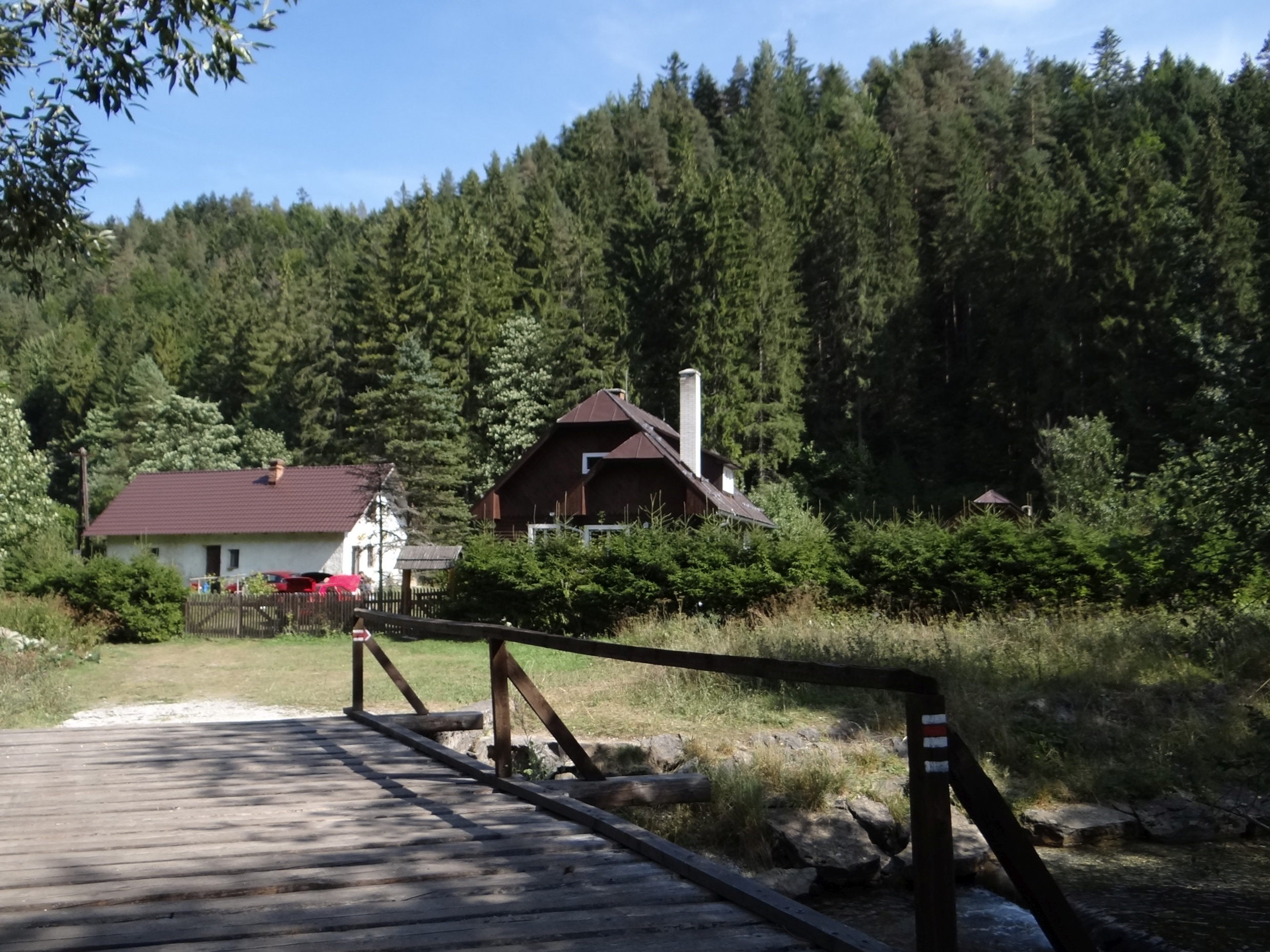 Štvrtocká píla (horáreň Sokol)